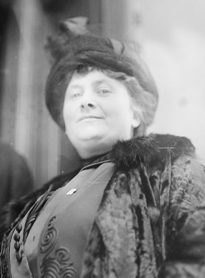 Italian educationist Maria Montessori (1870-1952)